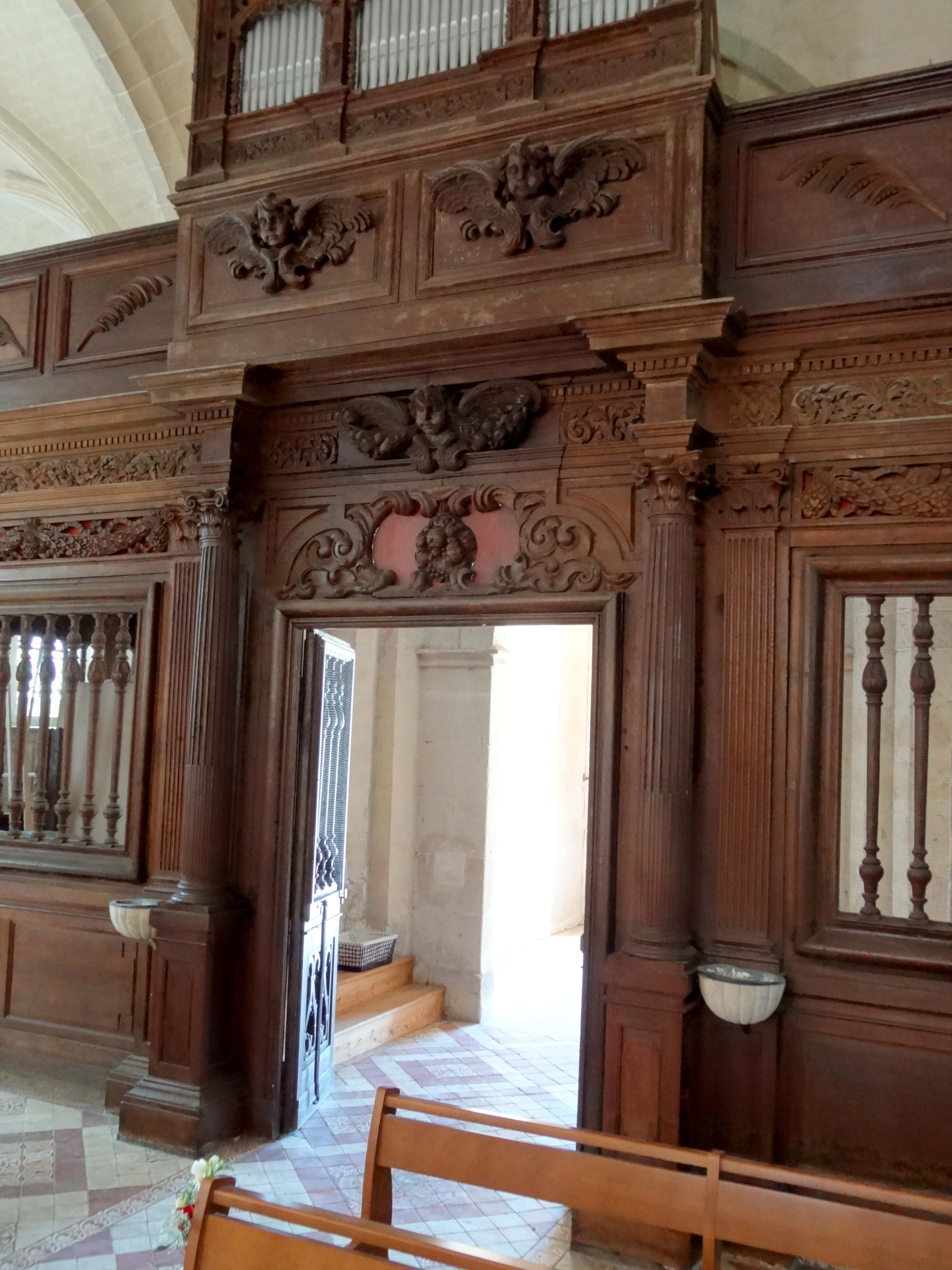 Mobilier de l'église - voir titre.